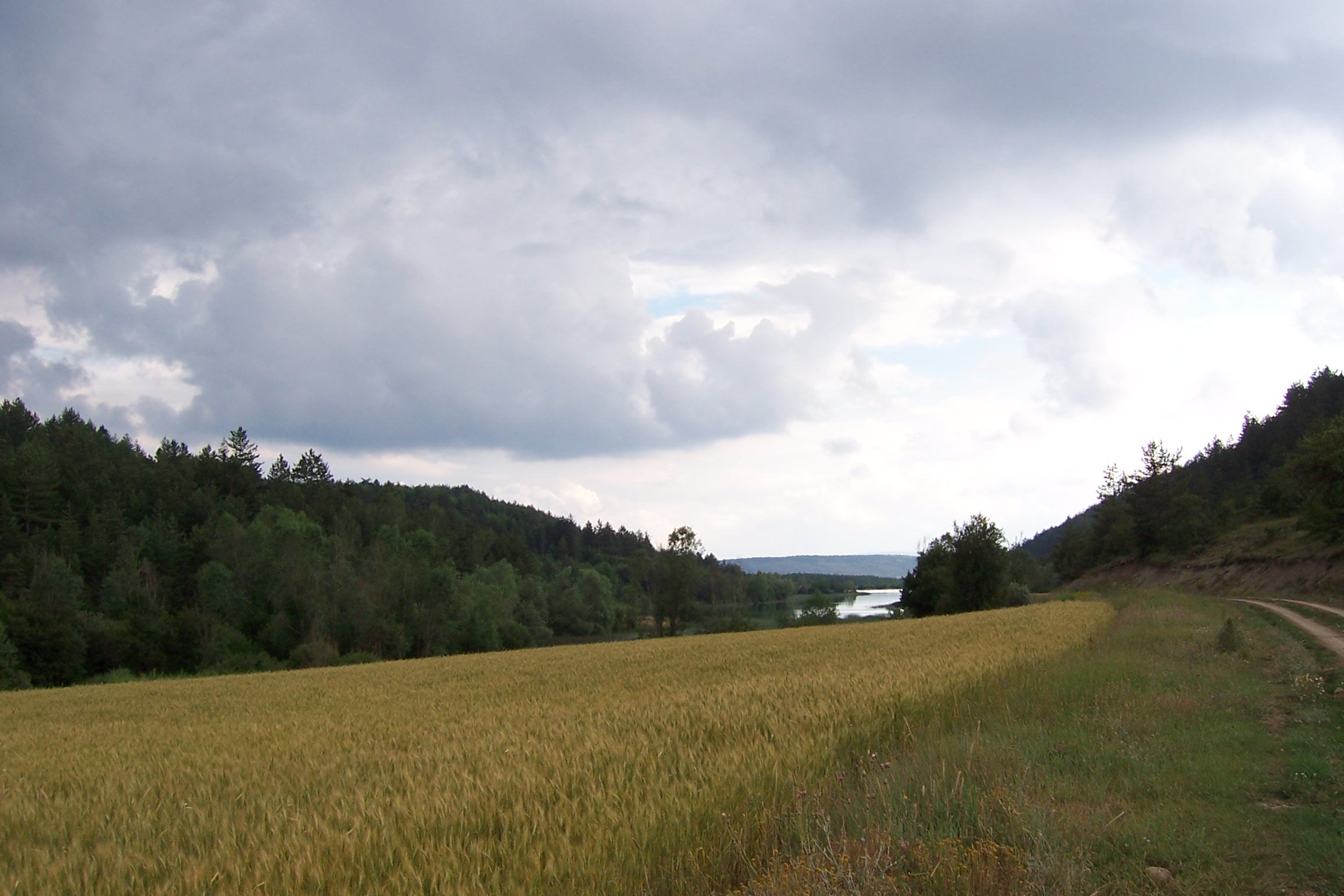 Eflani